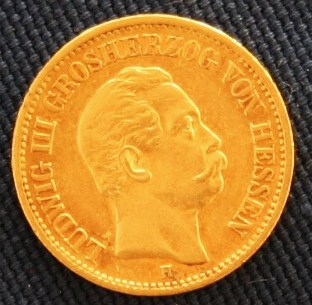 20 Goldmark von 1873 mit Konterfei Ludwig III.